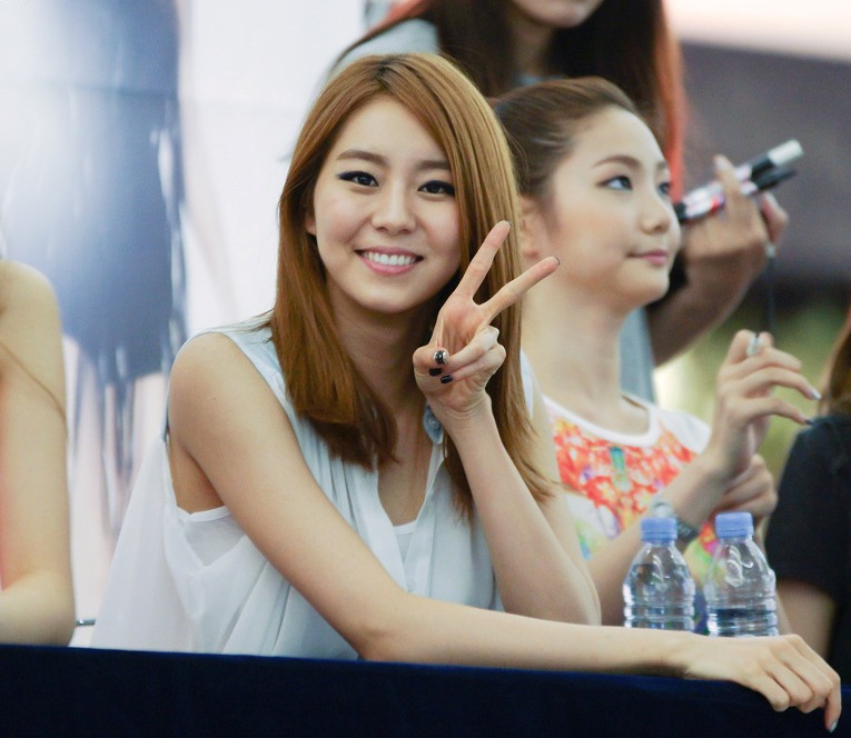 2012년 7월 1일 영등포 타임스퀘어 핫트랙스 팬사인회에서.